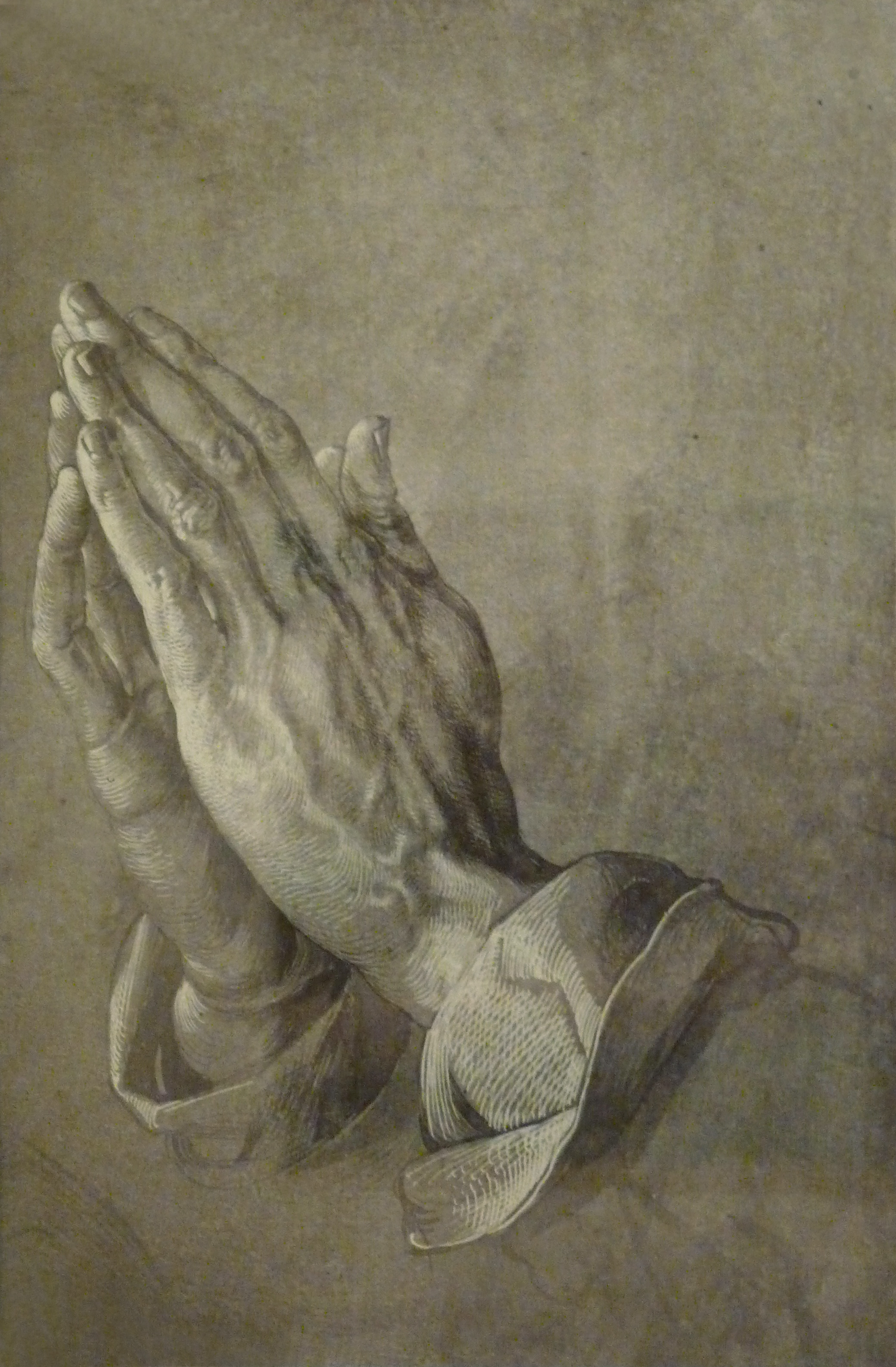 Adolphe Braun, Reproduction d'un dessin de Dürer, "Mains en prière", vers 1508, photographie [légèrement recadrée et retouchée] sur papier au charbon, Musée d'art moderne et contemporain de Strasbourg.